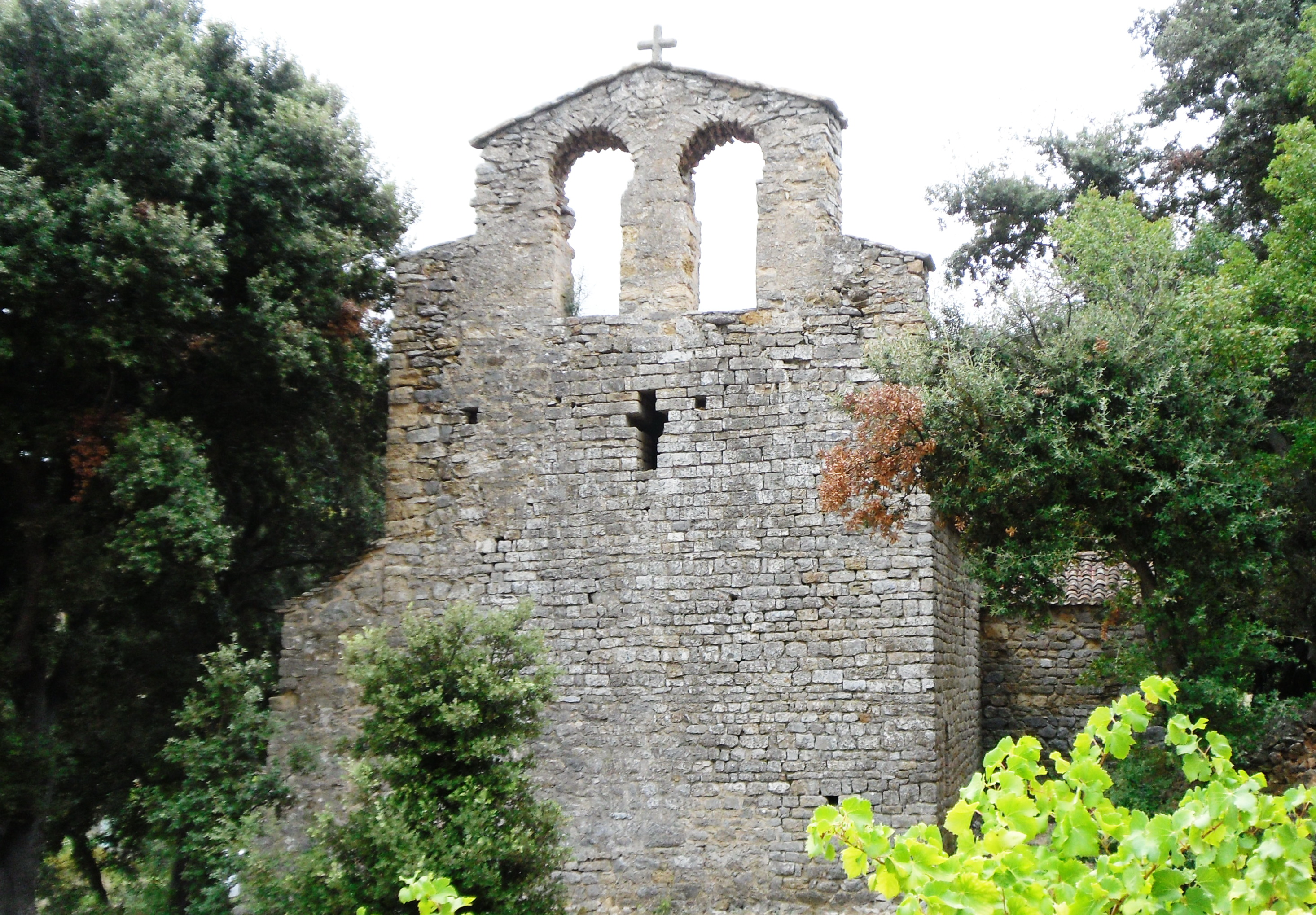 Chapelle Saint-Félix à Castelmaure